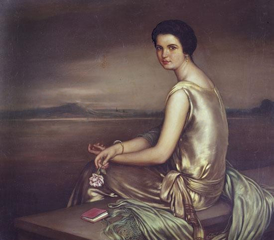 Excelentísima e Ilustrísima Doña Mª Concepción Luque Álvarez, Señora del Doctor Luque. Colección particular.